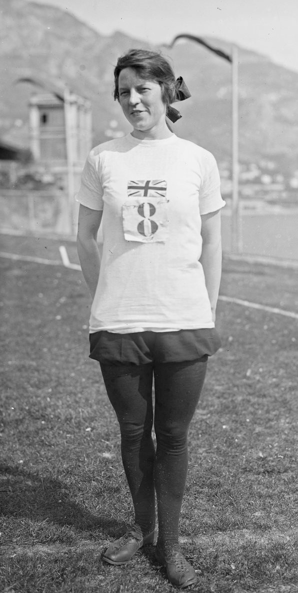 26-3-21, Miss [Mary] Lines [olympiades féminines de Monte-Carlo] : [photographie de presse] / [Agence Rol]